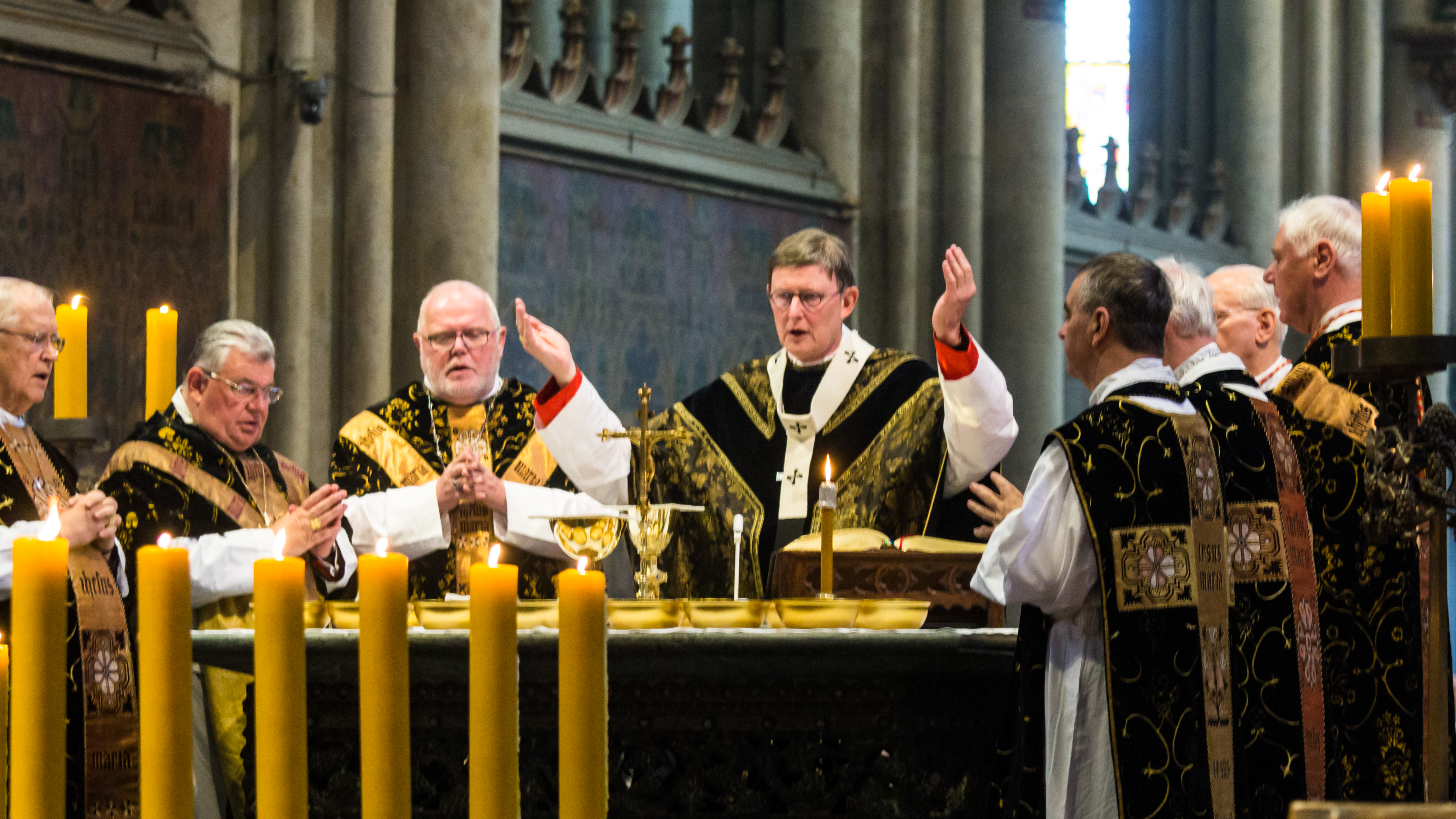 Exsequien Joachim Kardinal em. Meisner Foto: Rainer Maria Kardinal Woelki (in Orantenhaltung) mit Konzelebranten beim Hochgebet